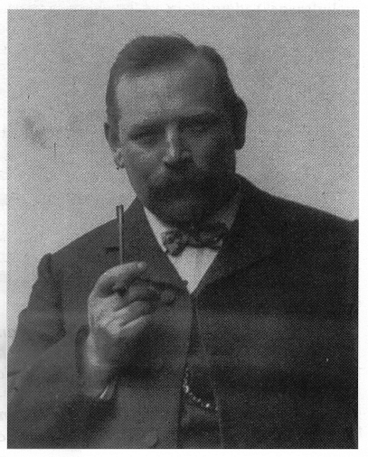 Arno Eugen Fritsche, around 1905